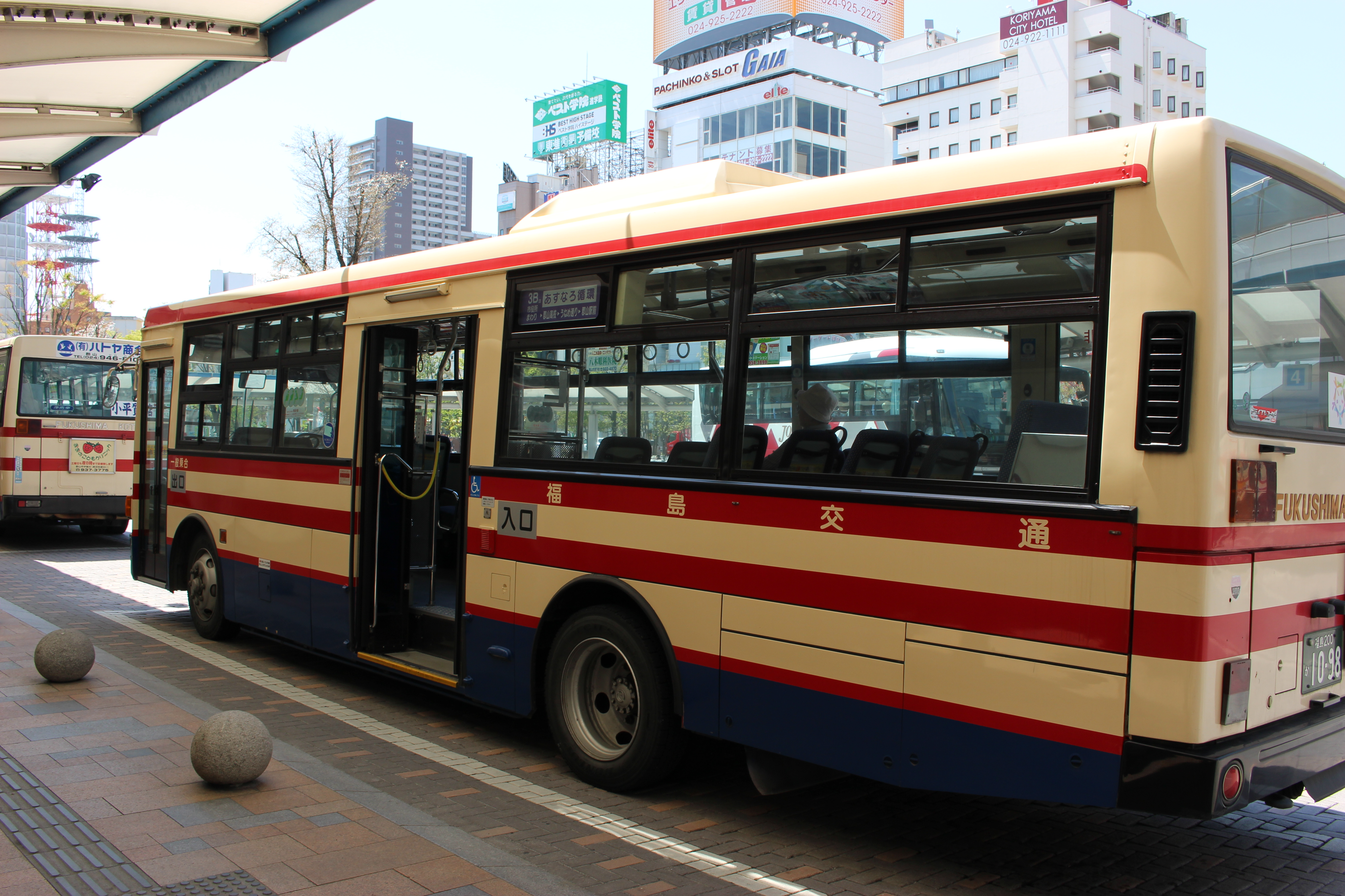 郡山駅前バス乗り場にて（2015年4月）